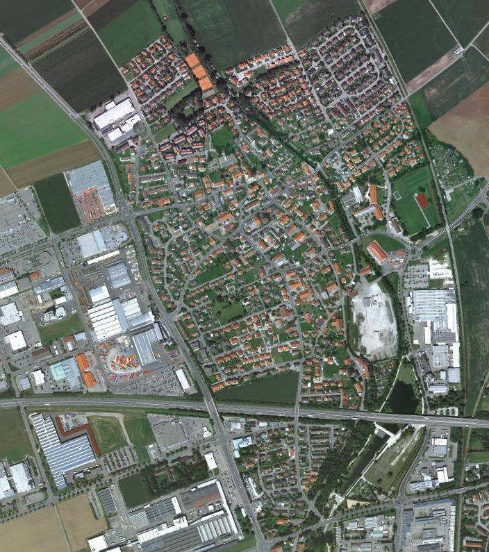 Ortophoto von Amendingen